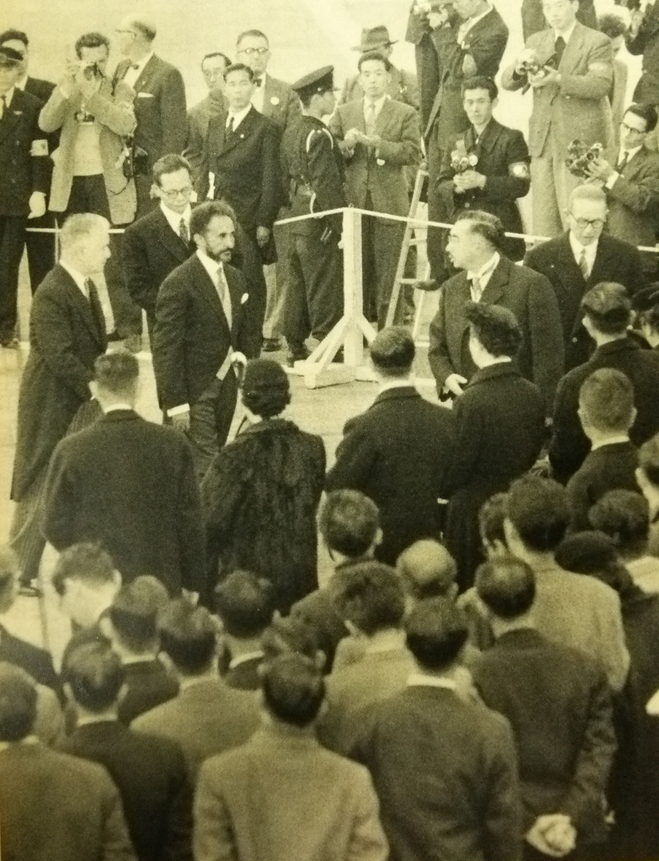 羽田空港でハイレ・セラシエ1世を出迎える昭和天皇（1956年11月19日）